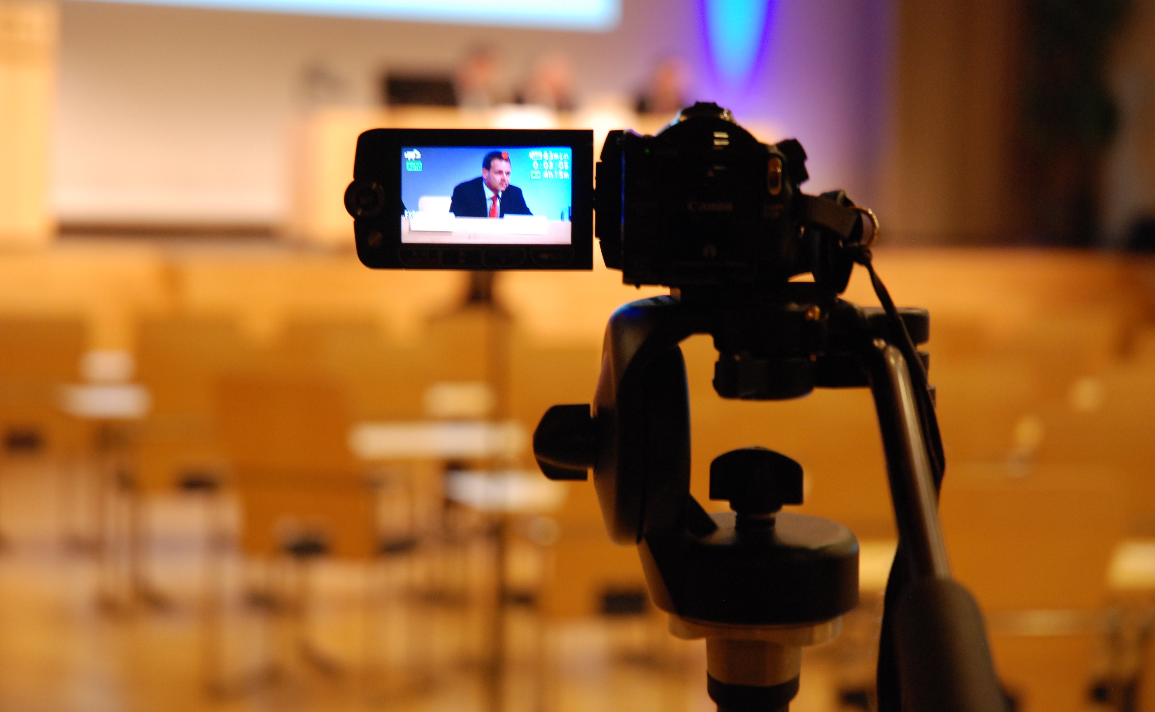 Optagelse af video ved et møde i Nordisk Råd